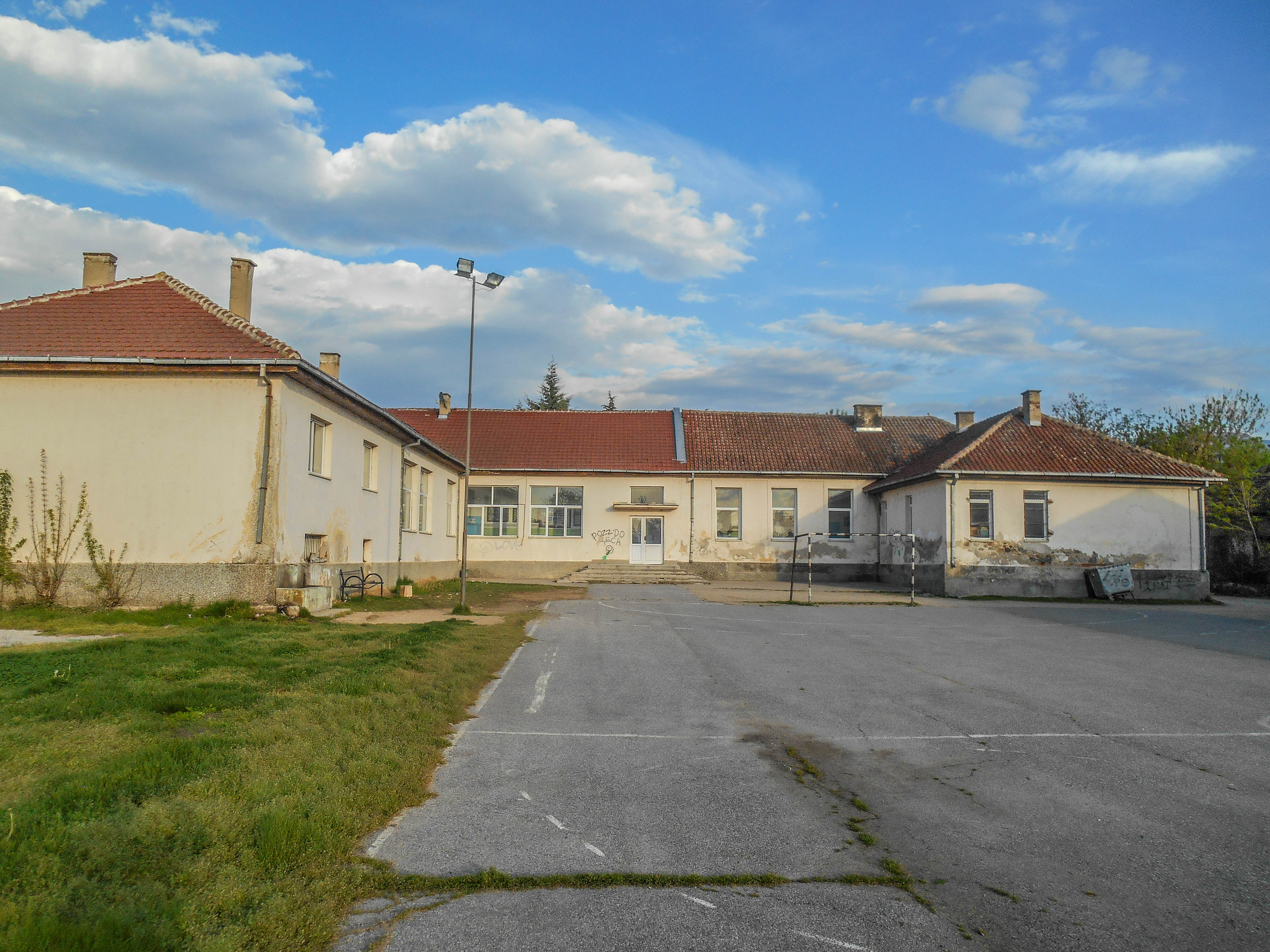 Основно училиште „Св. Кирил и Методиј“ - Турново